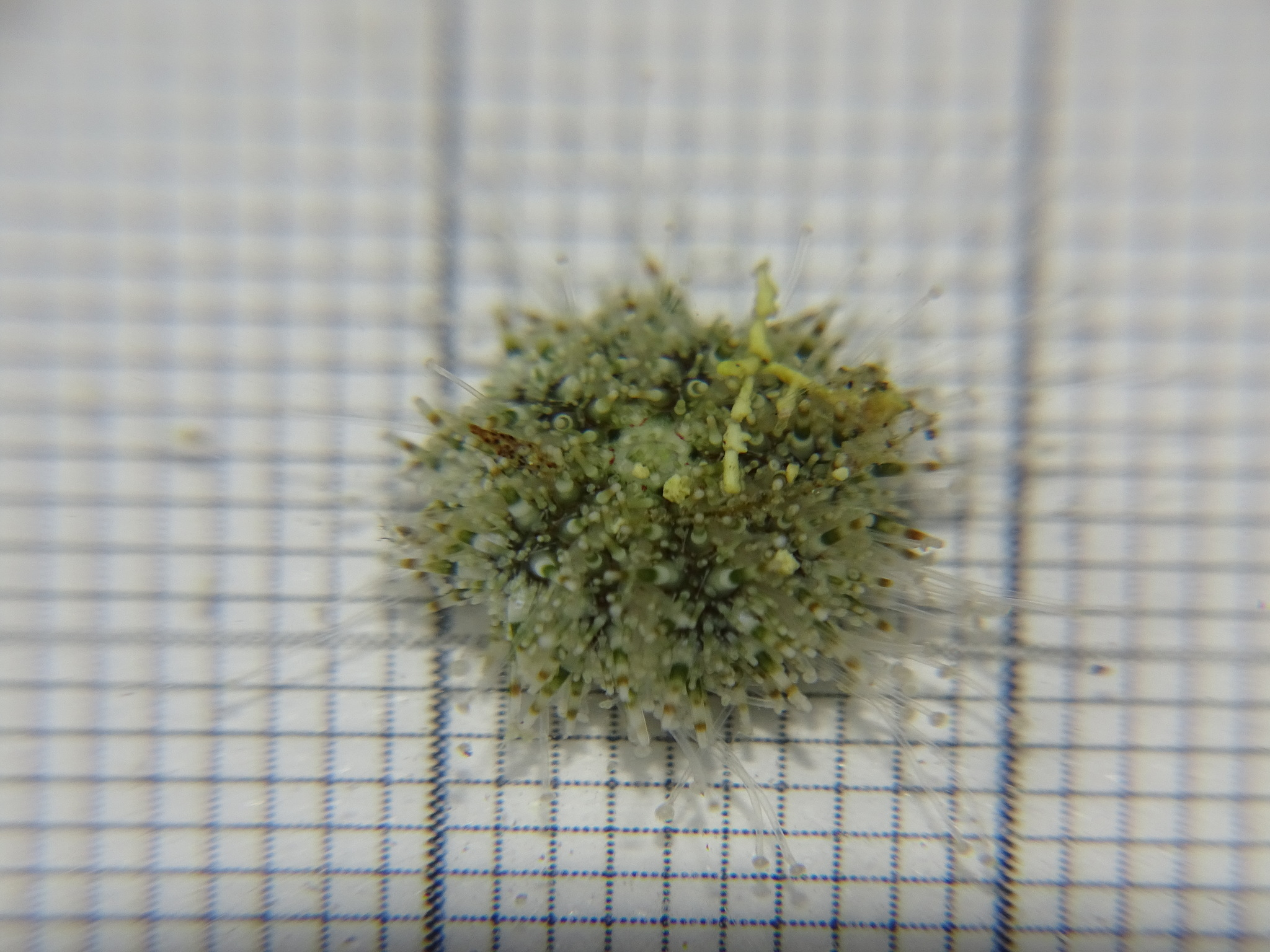 Pseudechinus novaezelandiae.